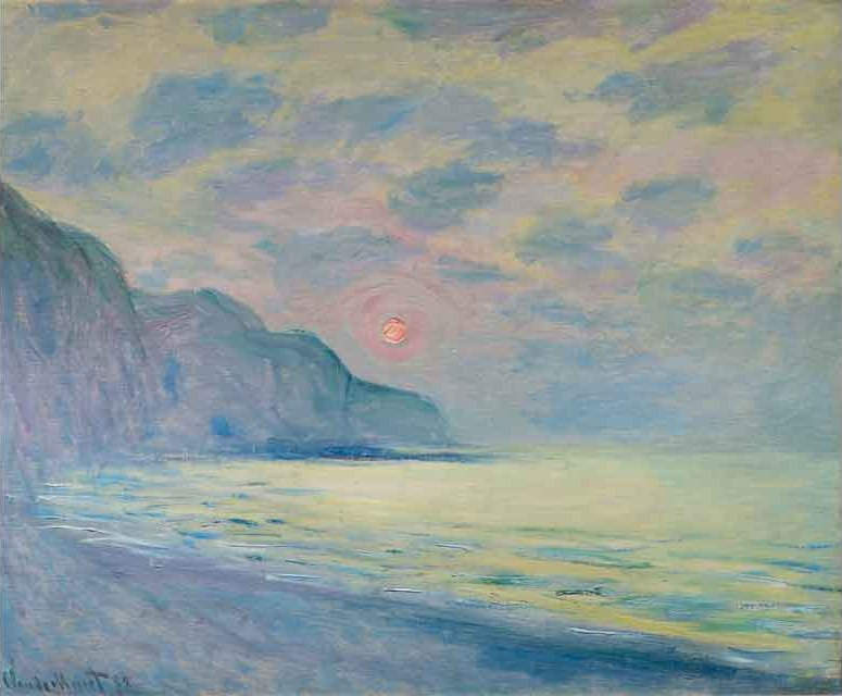 Soleil couchant, temp brumeux, Pourville